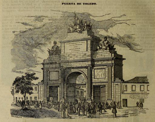 Puerta de Toledo hacia mediados del siglo XIX, Madrid, España.